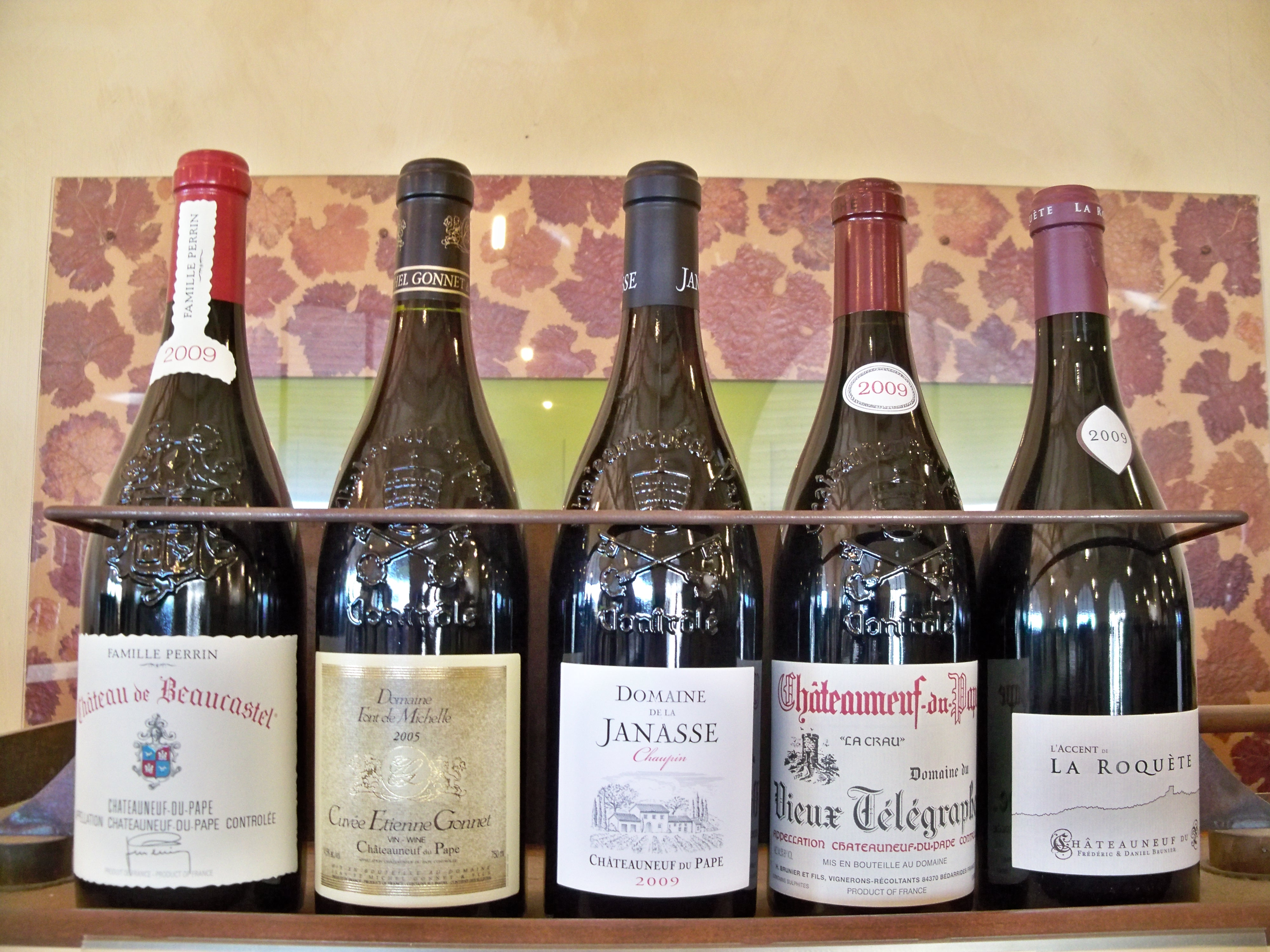 Bouteilles de Chateauneuf du Pape rouge